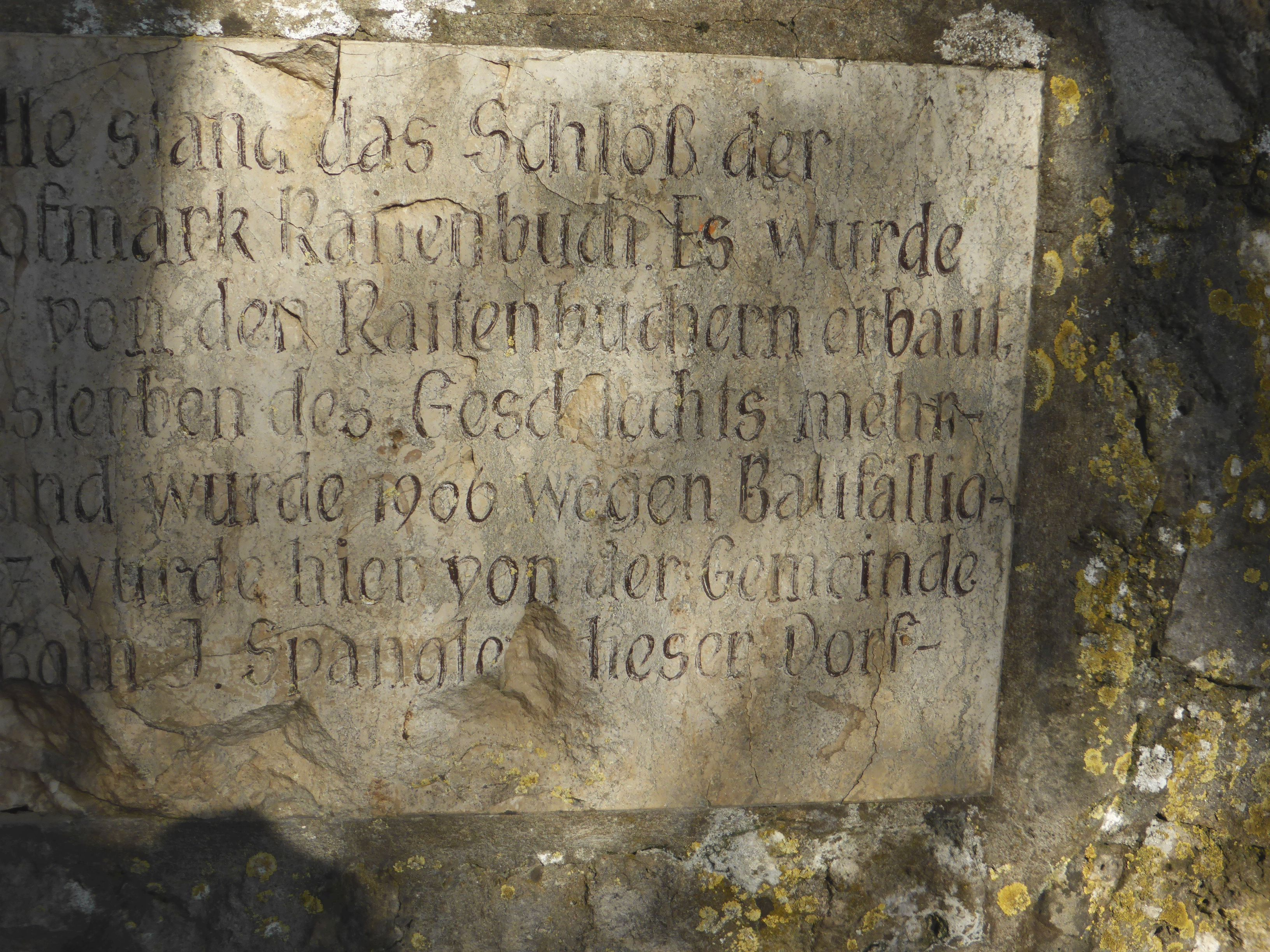 Erinnerungstafel an das Hofmarkschloss der Raitenbucher in Raitenbuch